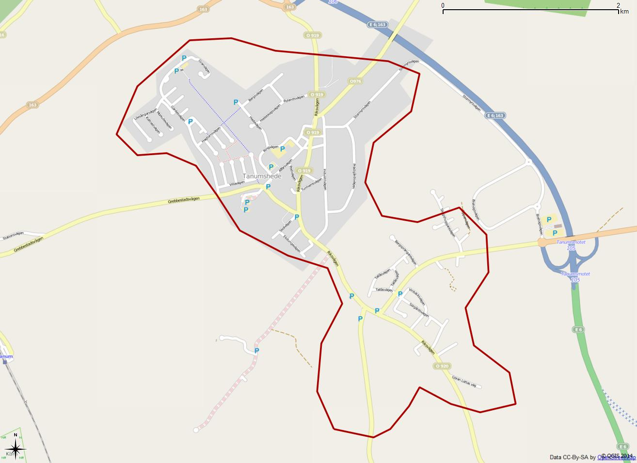 Tätorten Tanumshedes gränser 1990 enligt Atlas över rikets indelningar 1992.